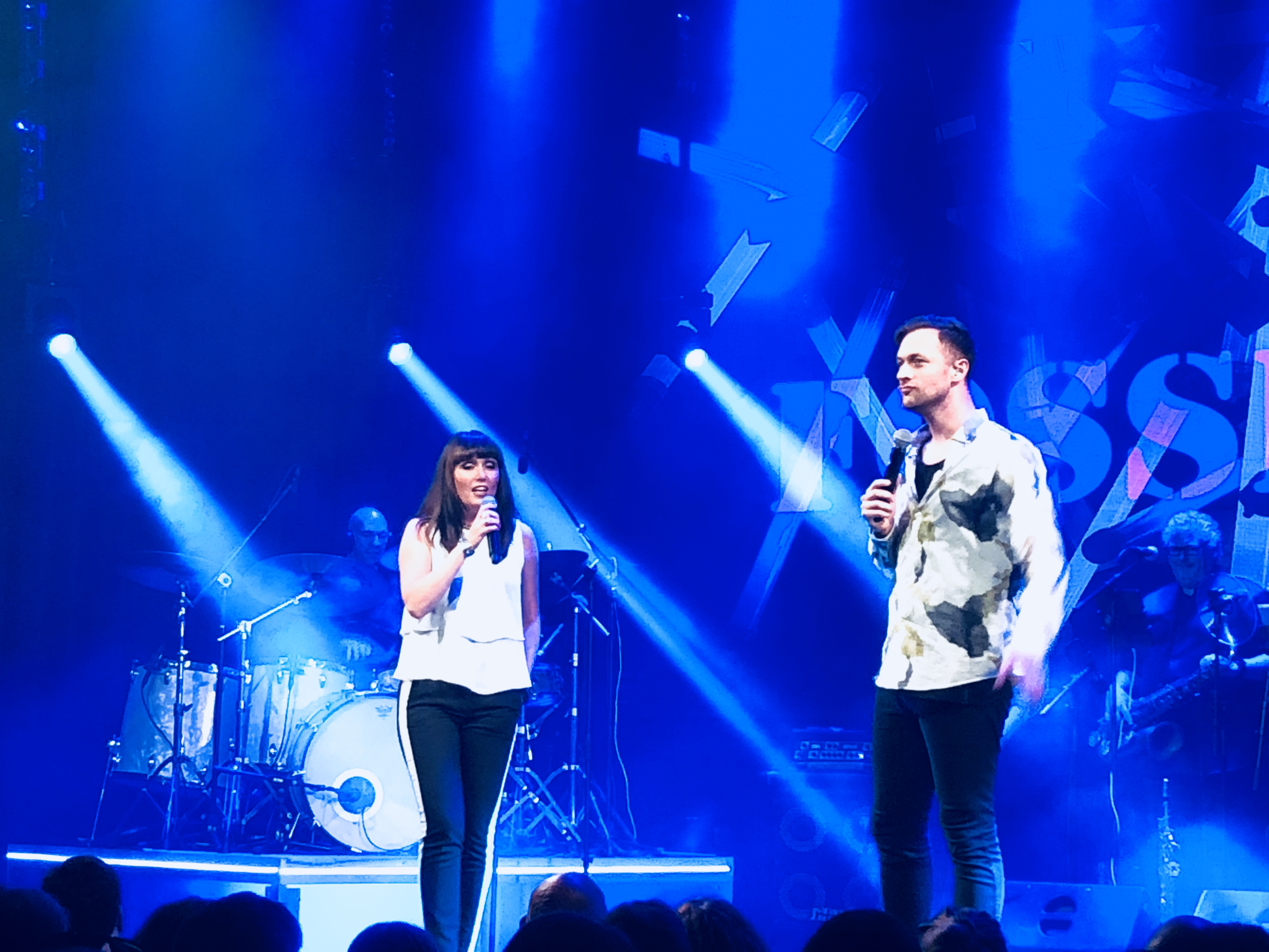 Marte Helleseter Hval, norsk sanger, og Bjørnar Reime Erlandsen, norsk sanger og skuespiller, ved Fosserock 2018 i Hønefoss.